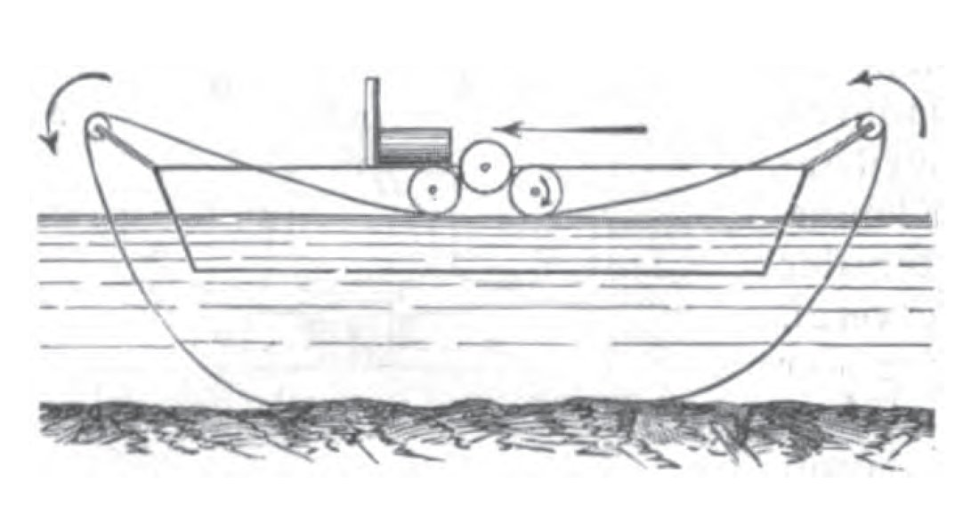 Bewegung von Schiffen durch Bodenreibung von Ketten ohne Ende